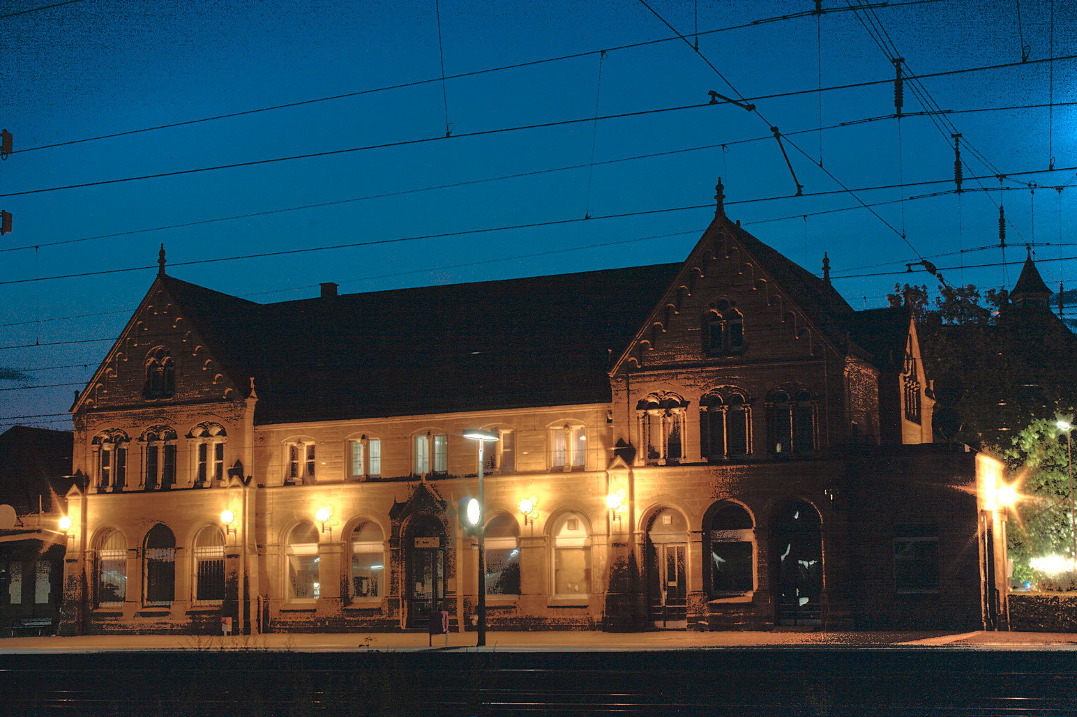 Nachtaufnahme des Bahnhofs in Gelnhausen, Hessen (Deutschland) Bahnhof Gelnhausen